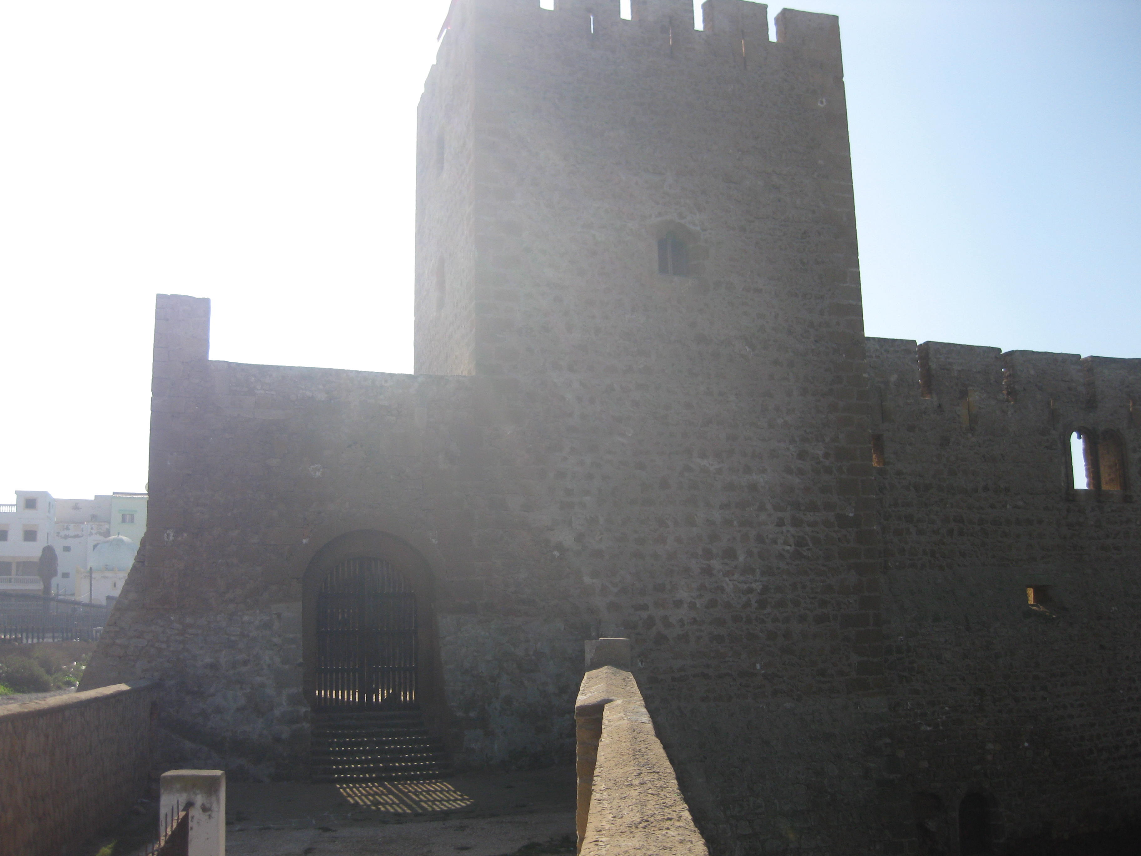 Les remparts de Safi bâtis par les portugais au XV° siècle existent encore aujourd'hui.